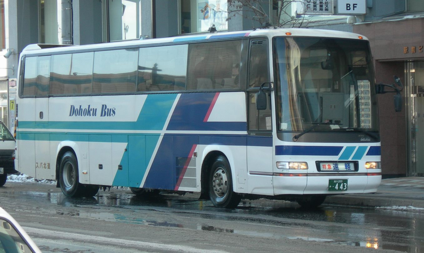 Dohoku Bus car 道北バス 特急北大雪号